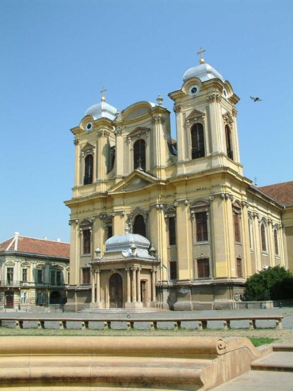 Categorie:Imagini din Timișoara